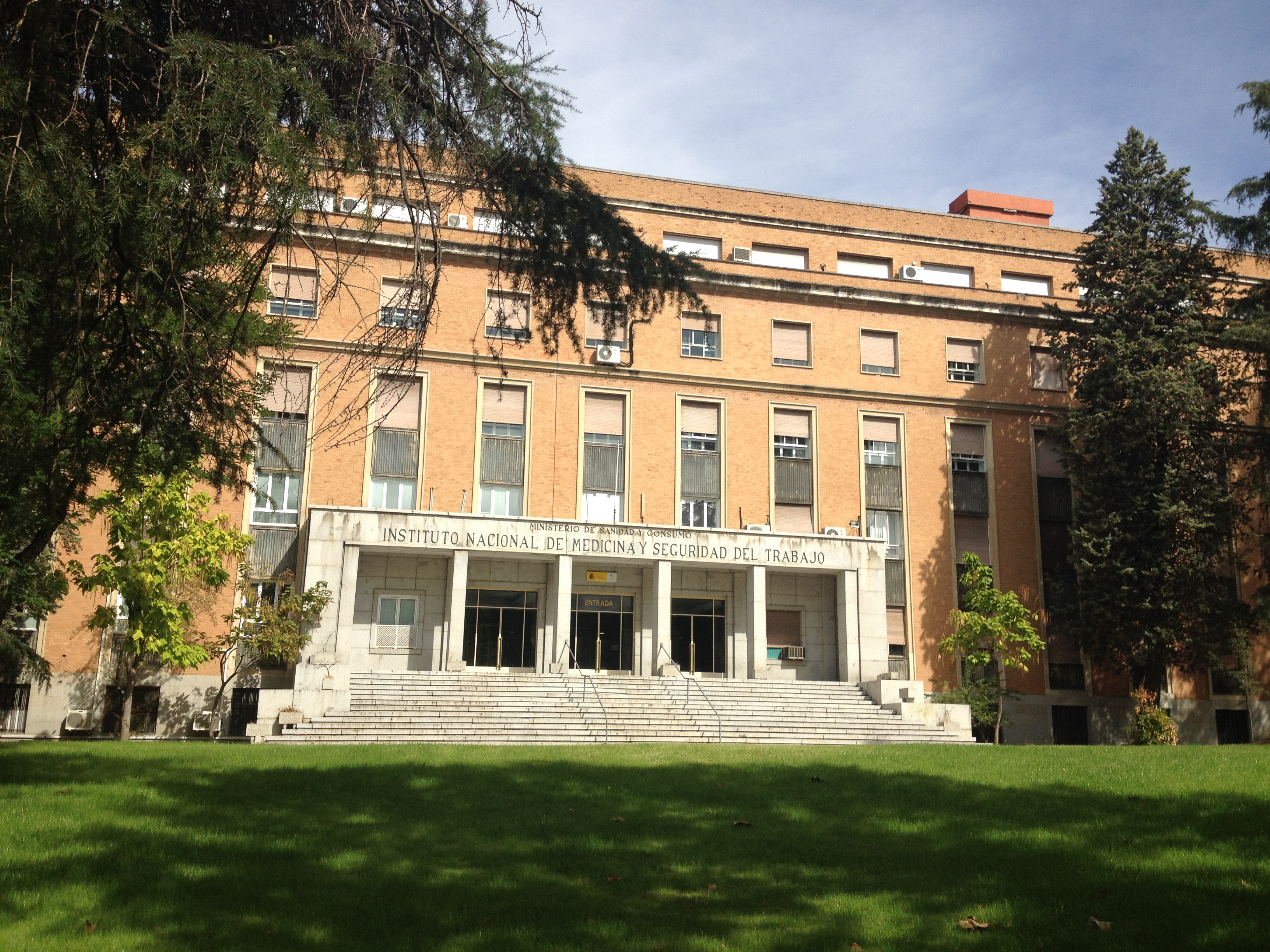 Pabellón 8 de la Facultad de Medicina de la Universidad Complutense de Madrid